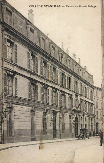 Carte postale ancienne. L'entrée du Collège Stanislas, au 22 rue Notre-Dame-des-Champs dans le 6ème arrondissement de Paris. Le bâtiment existe toujours.